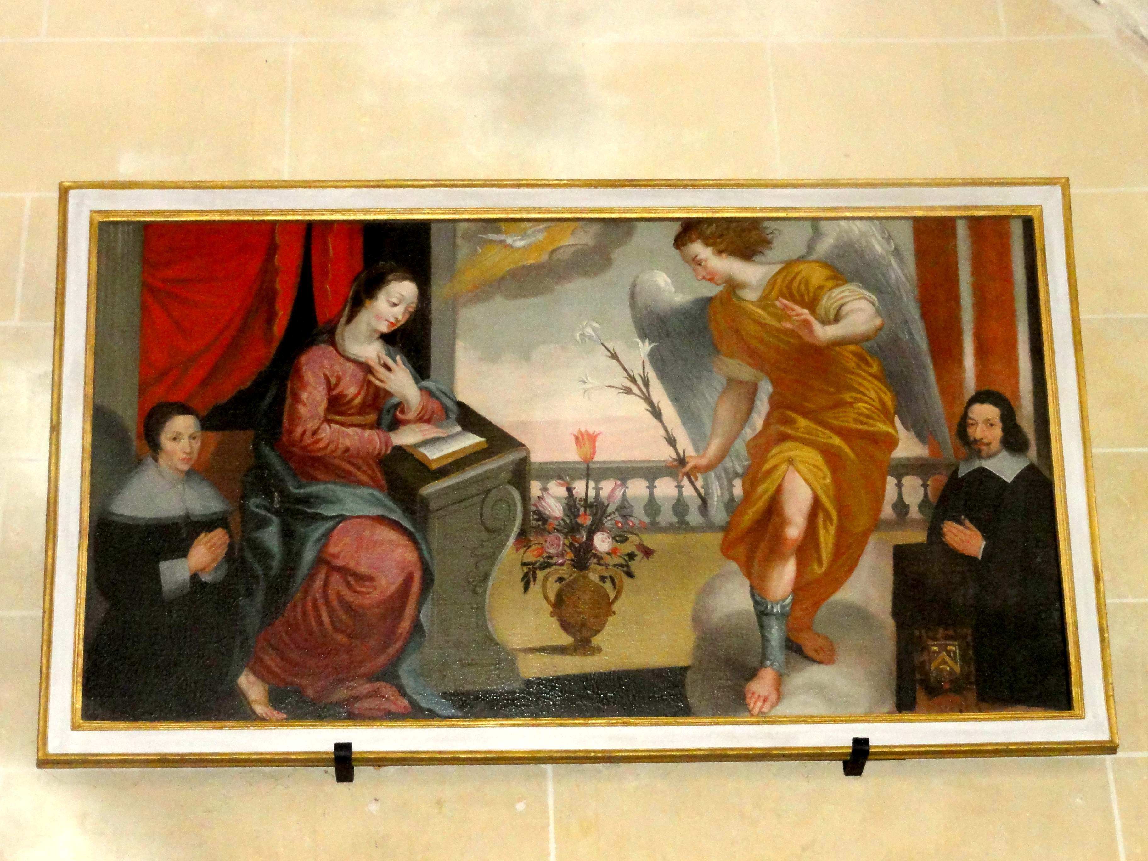 Tableau peint à l'huile sur toile - L'Annonciation, second quart XVIIe siècle, restaurée en 2010 par Marie Parant-Andaloro.